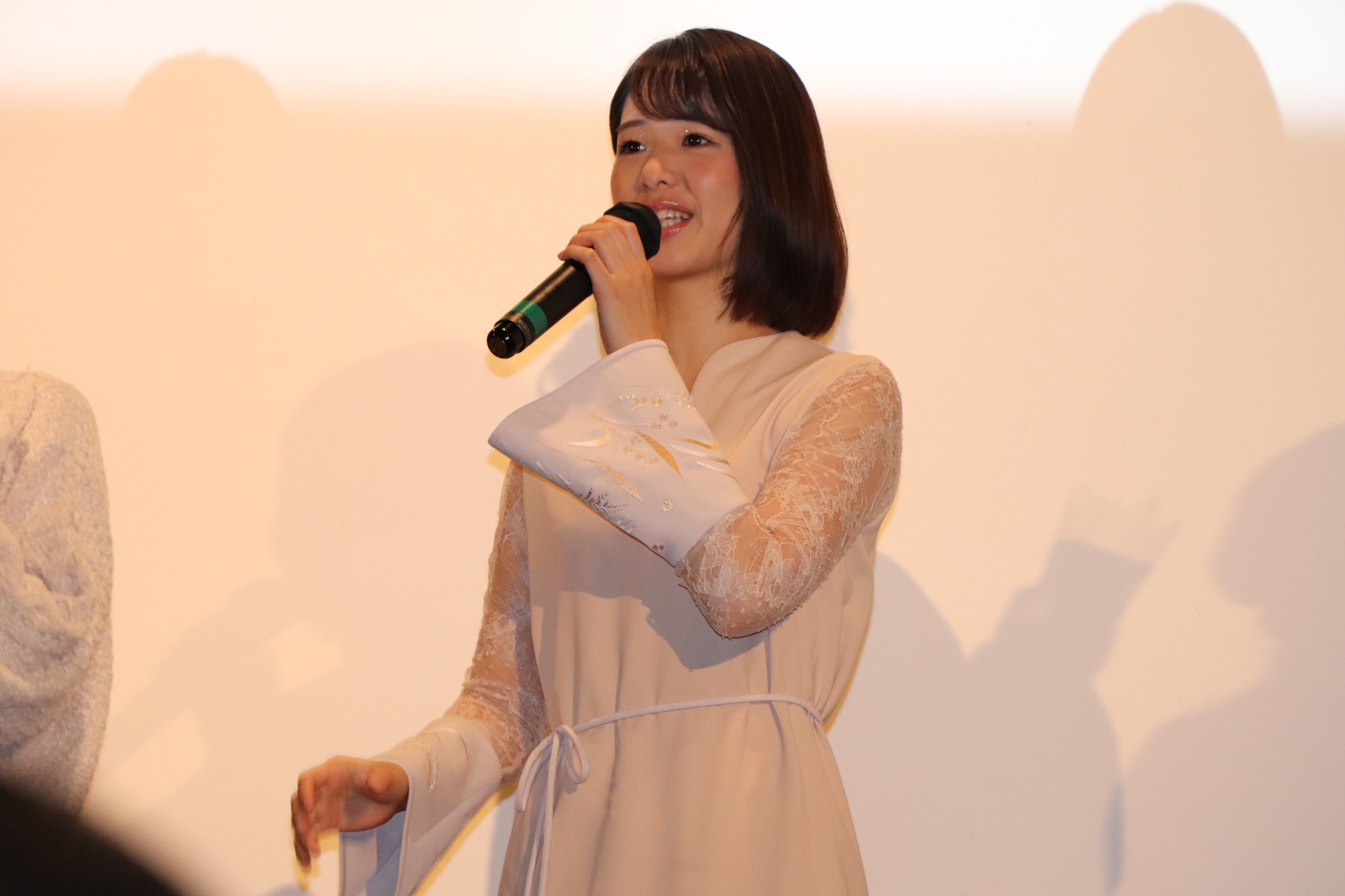 上野オークラ劇場『発情物語』舞台挨拶